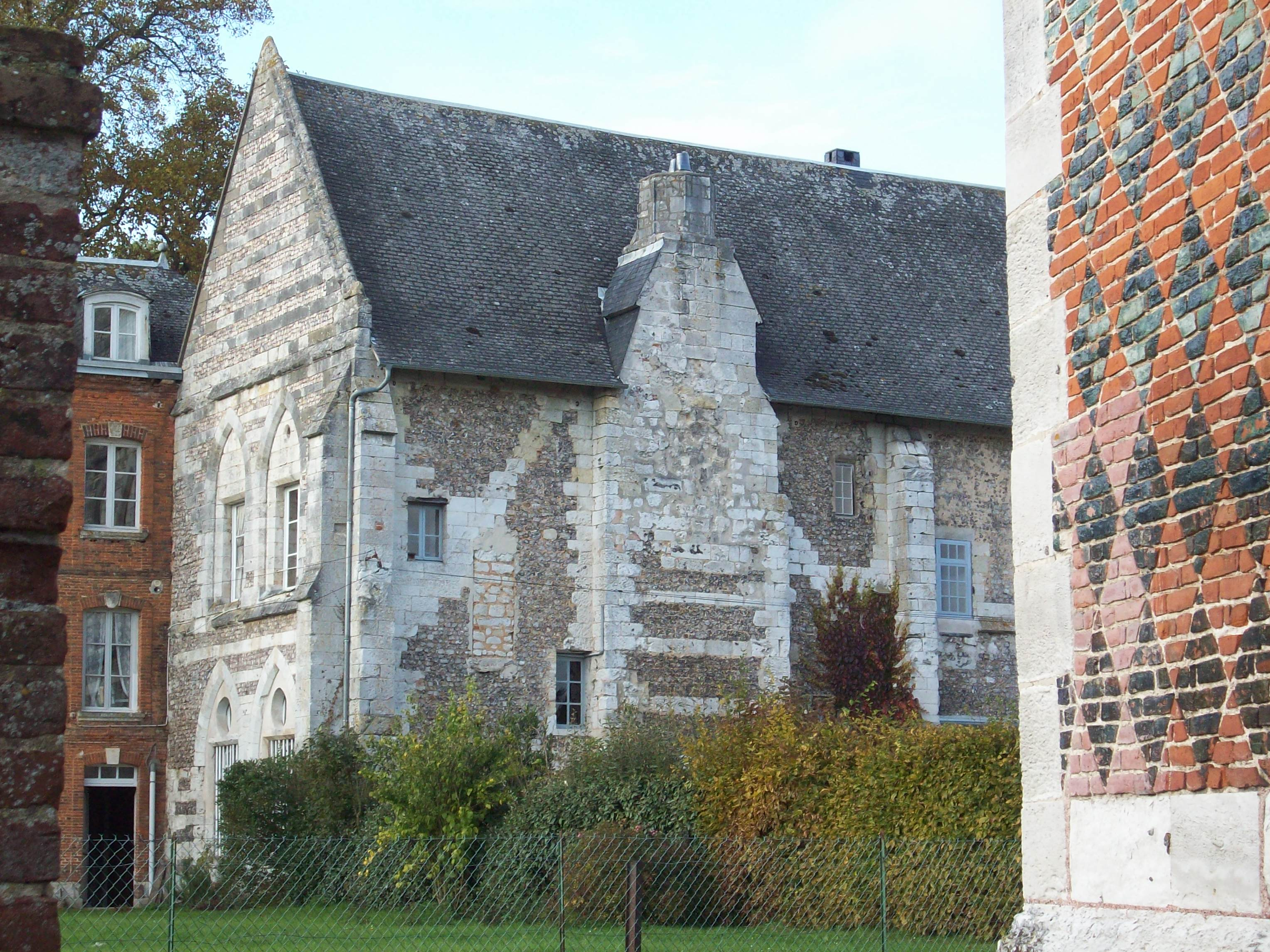 Manoir de l'abbaye de Saint-Amand, à Boos.